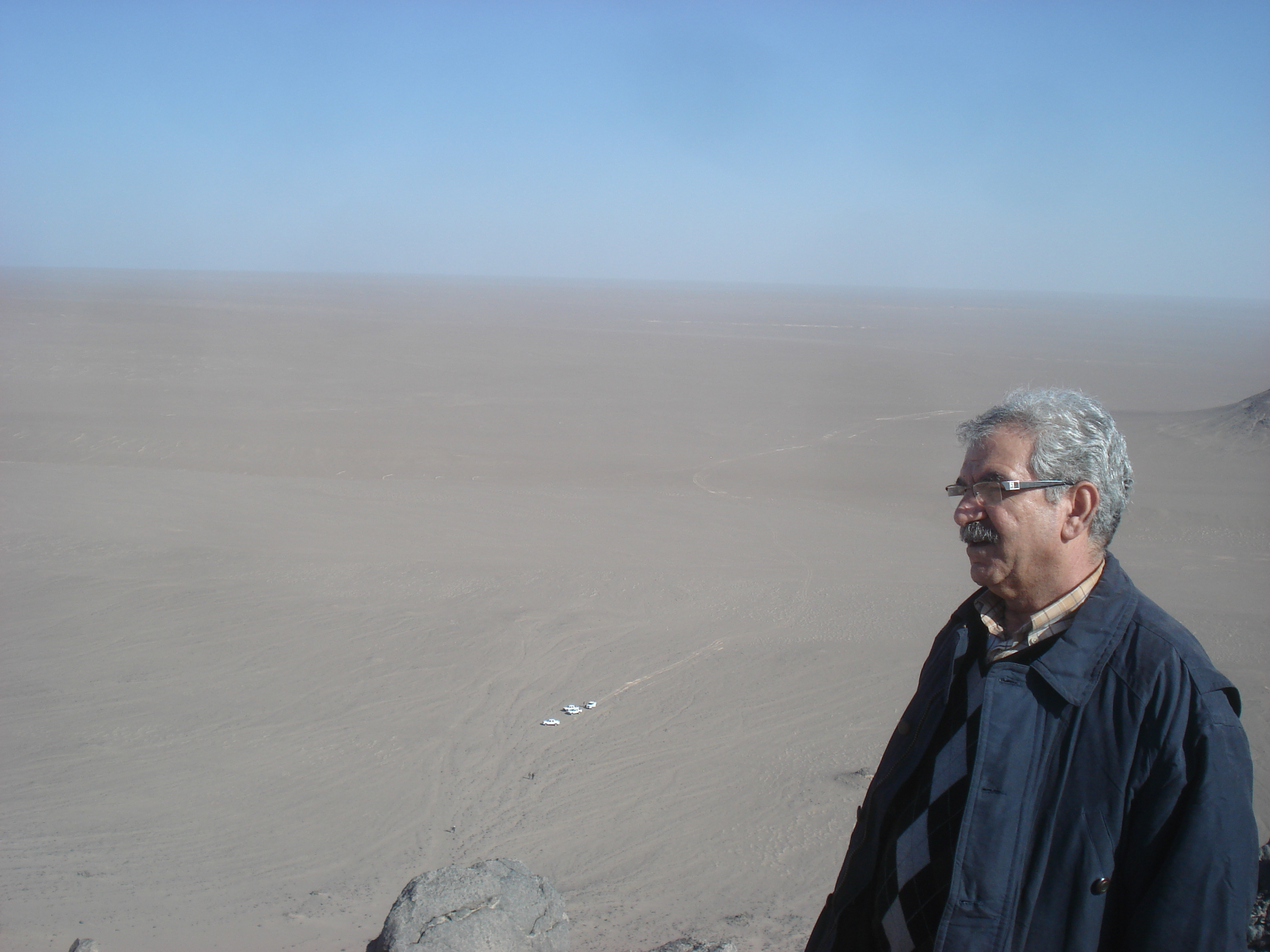 دکتر سید کاظم علوی پناه